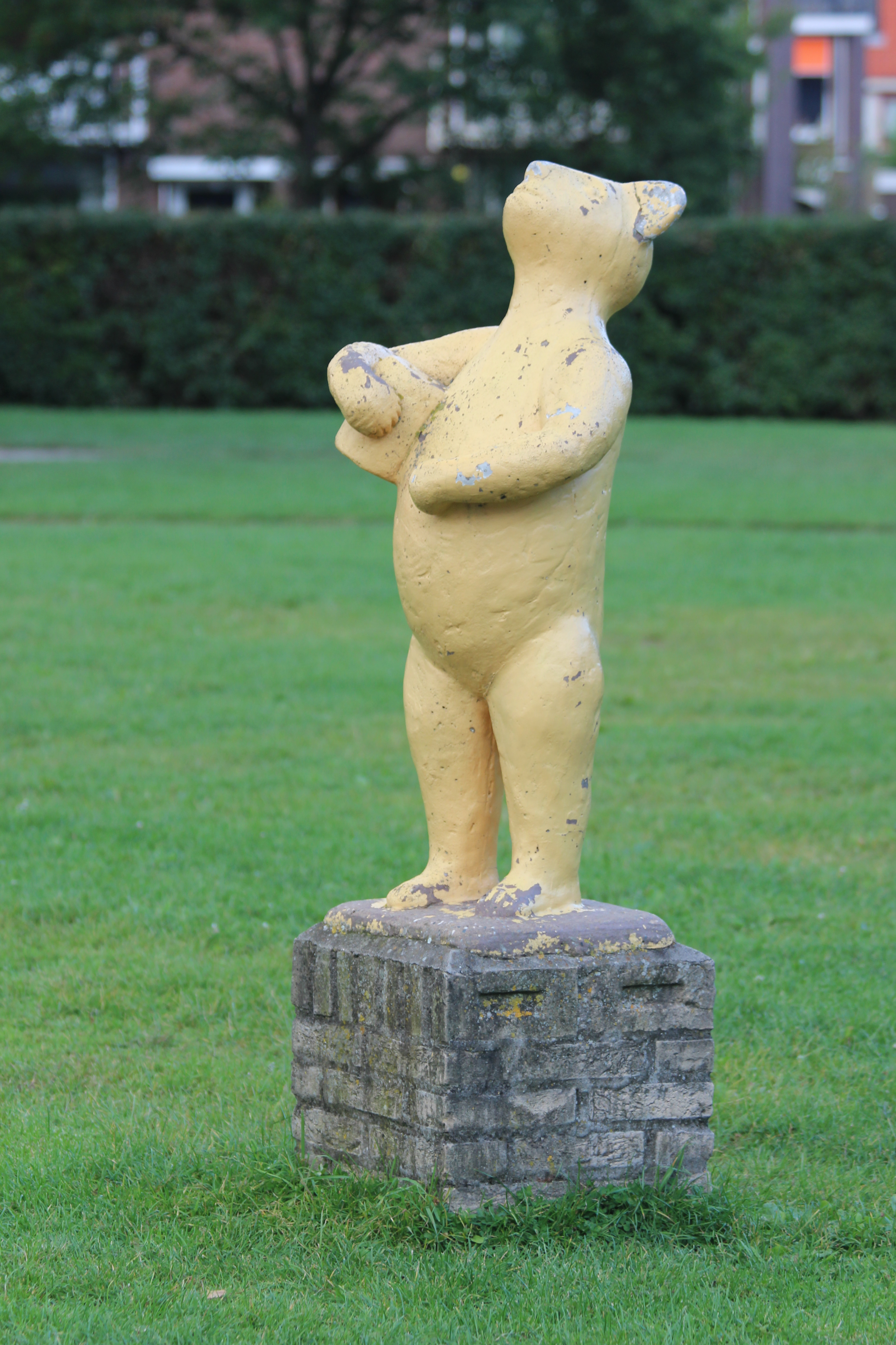 Winnie de Poeh - Leiderdorp. Beeld in Leiderdorp. Prins Willem Alexanderschool